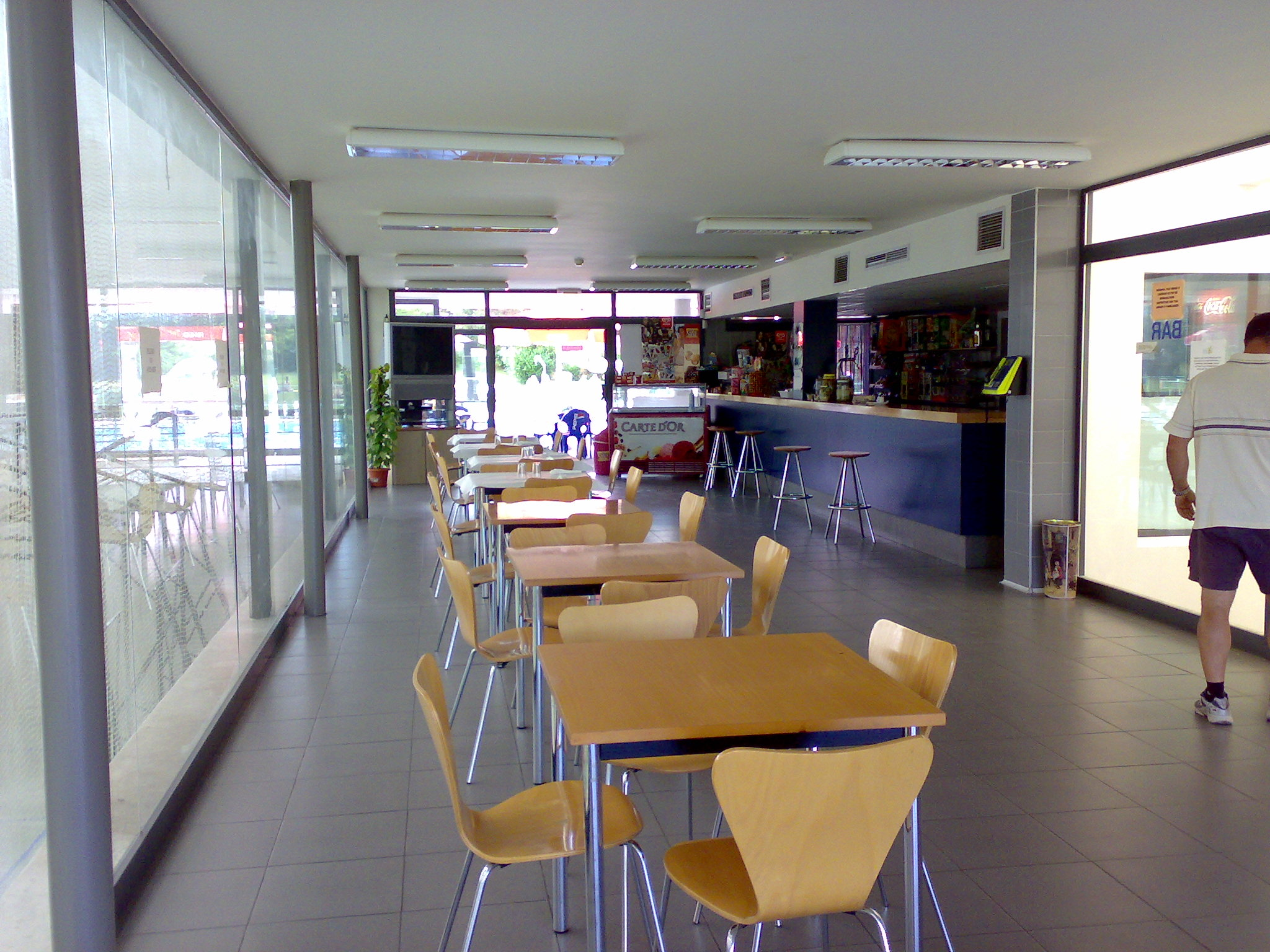 Cafeteria Iturtxipia